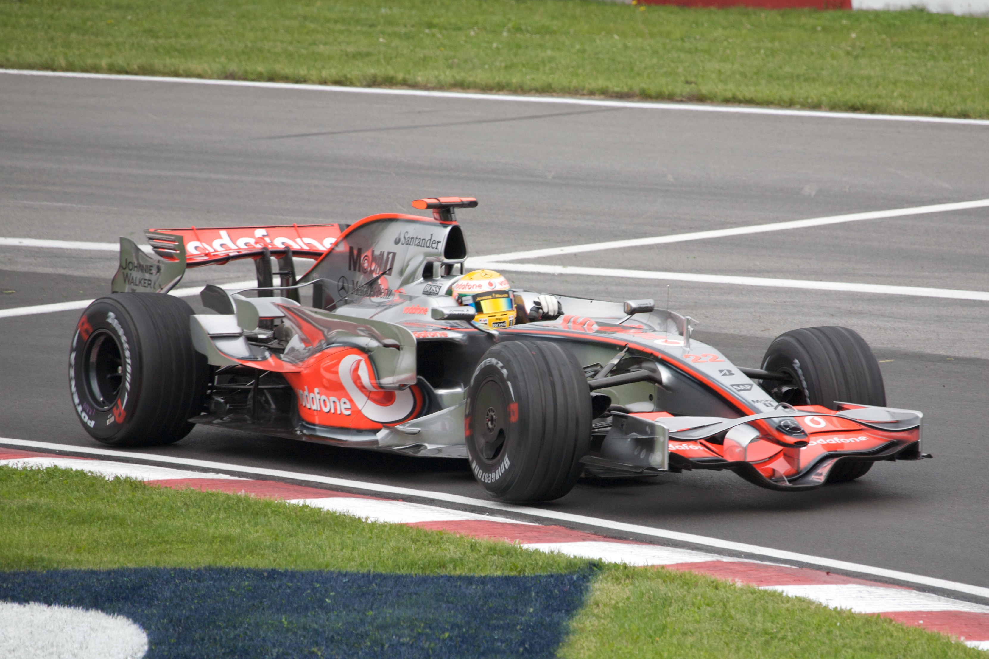 Hamilton at Canada 2008